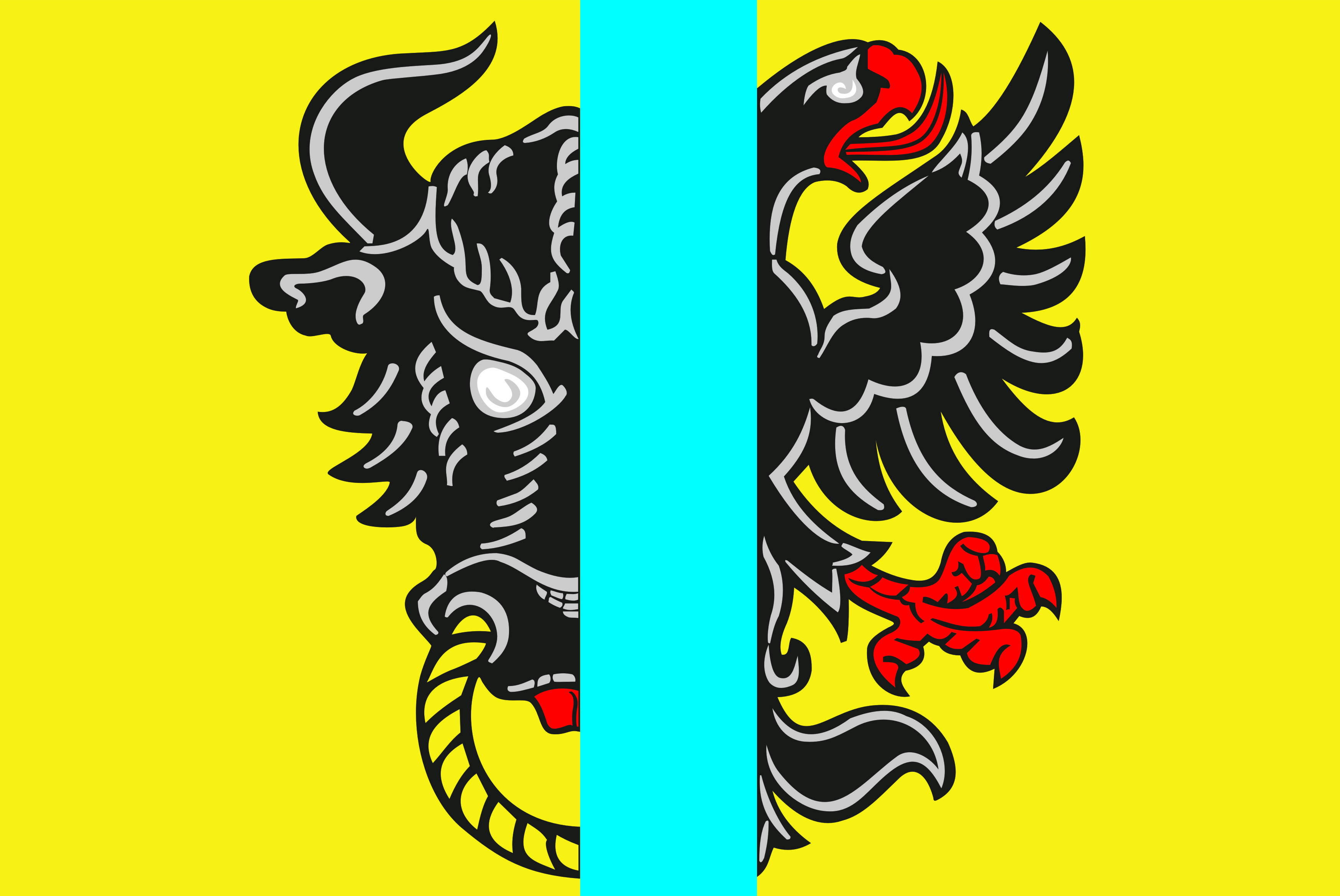 vlajka města Bystřice nad Pernštejnem